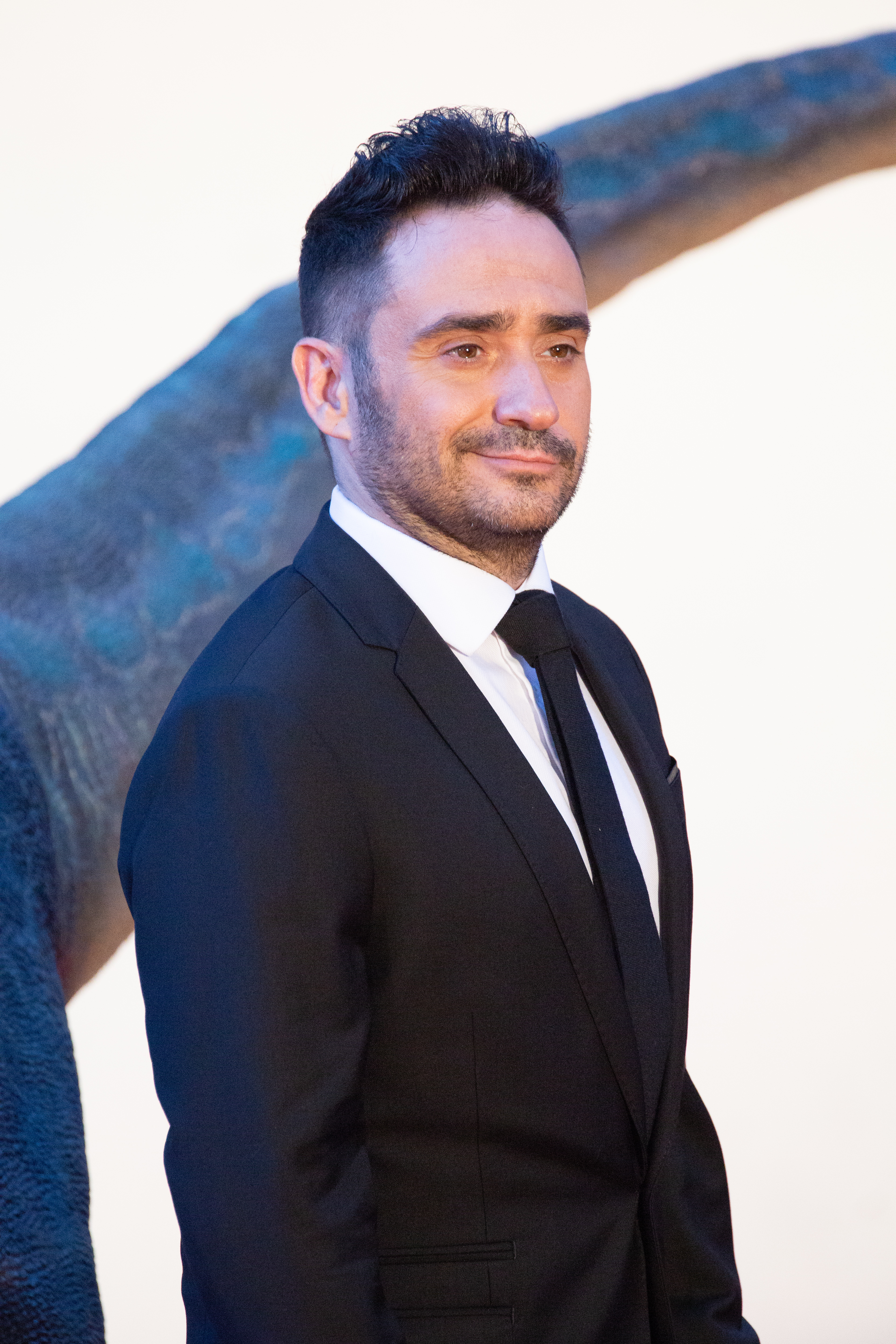 ジュラシック・ワールド/炎の王国 ジャパン・プレミア レッドカーペット J・A・バヨナ